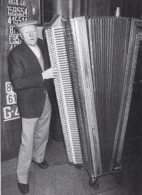 De grootste accordeon ter wereld